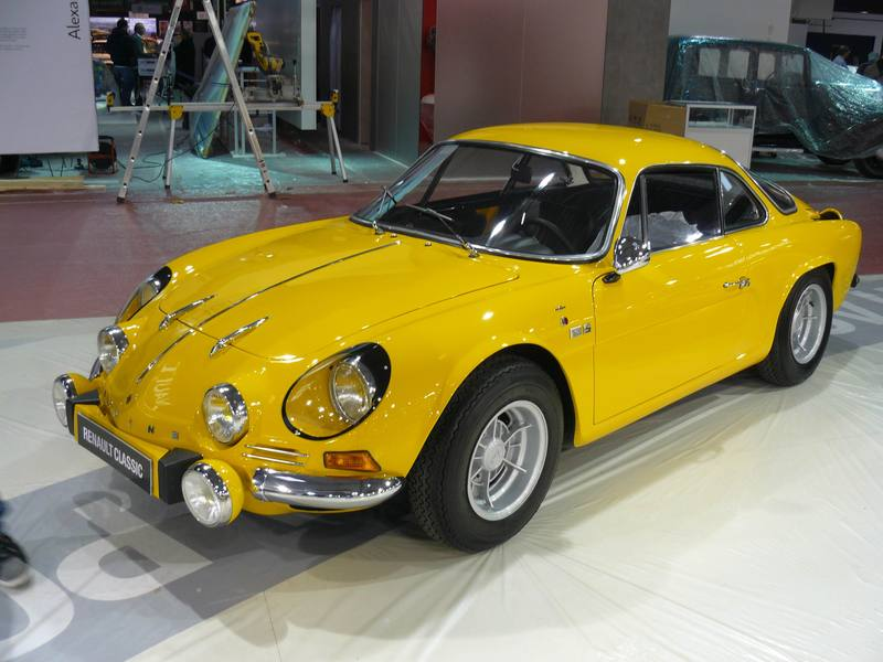 Renault Alpine A110 1600S á Rétromobile 2012